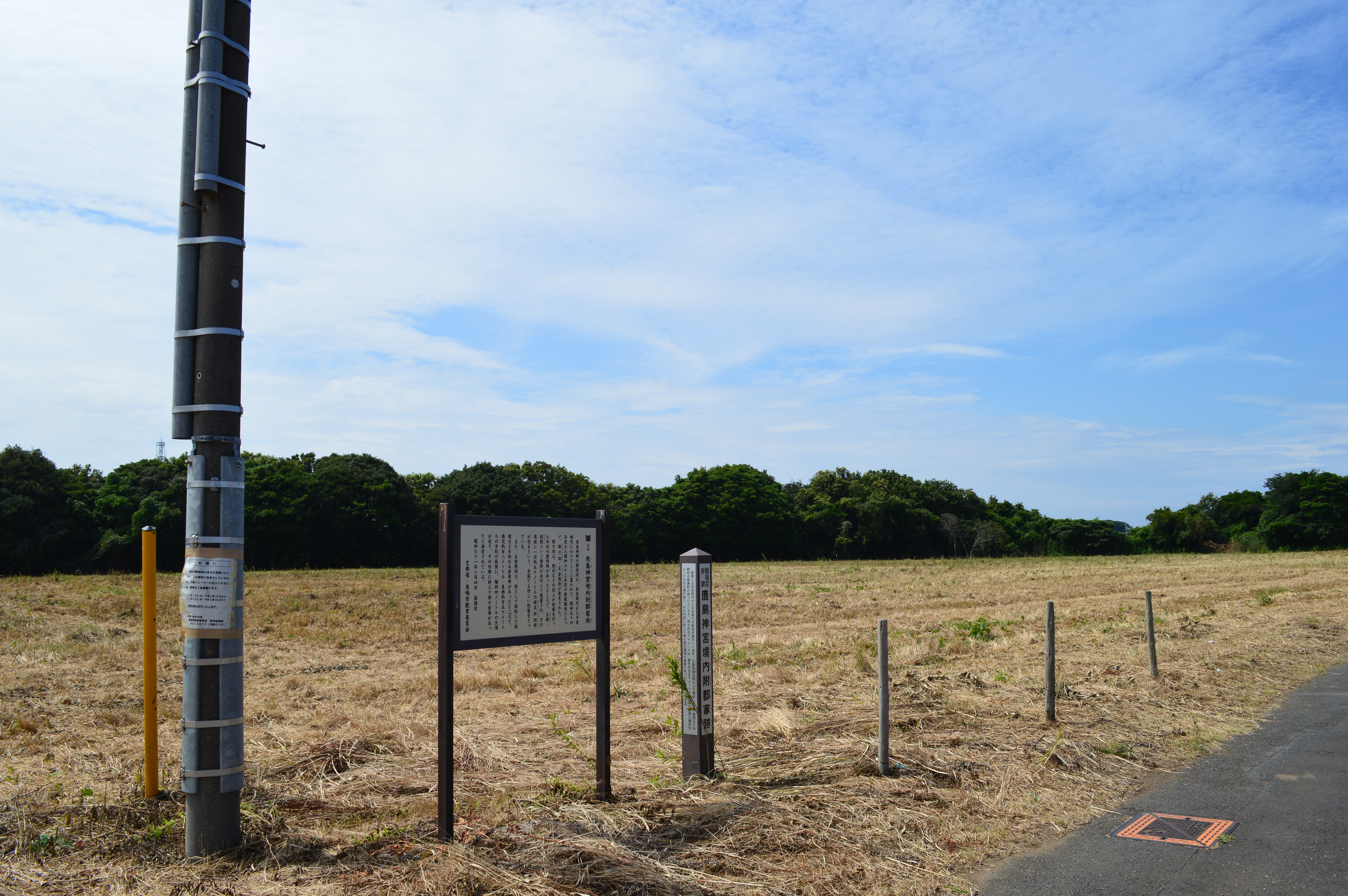 鹿島郡家跡 遠景